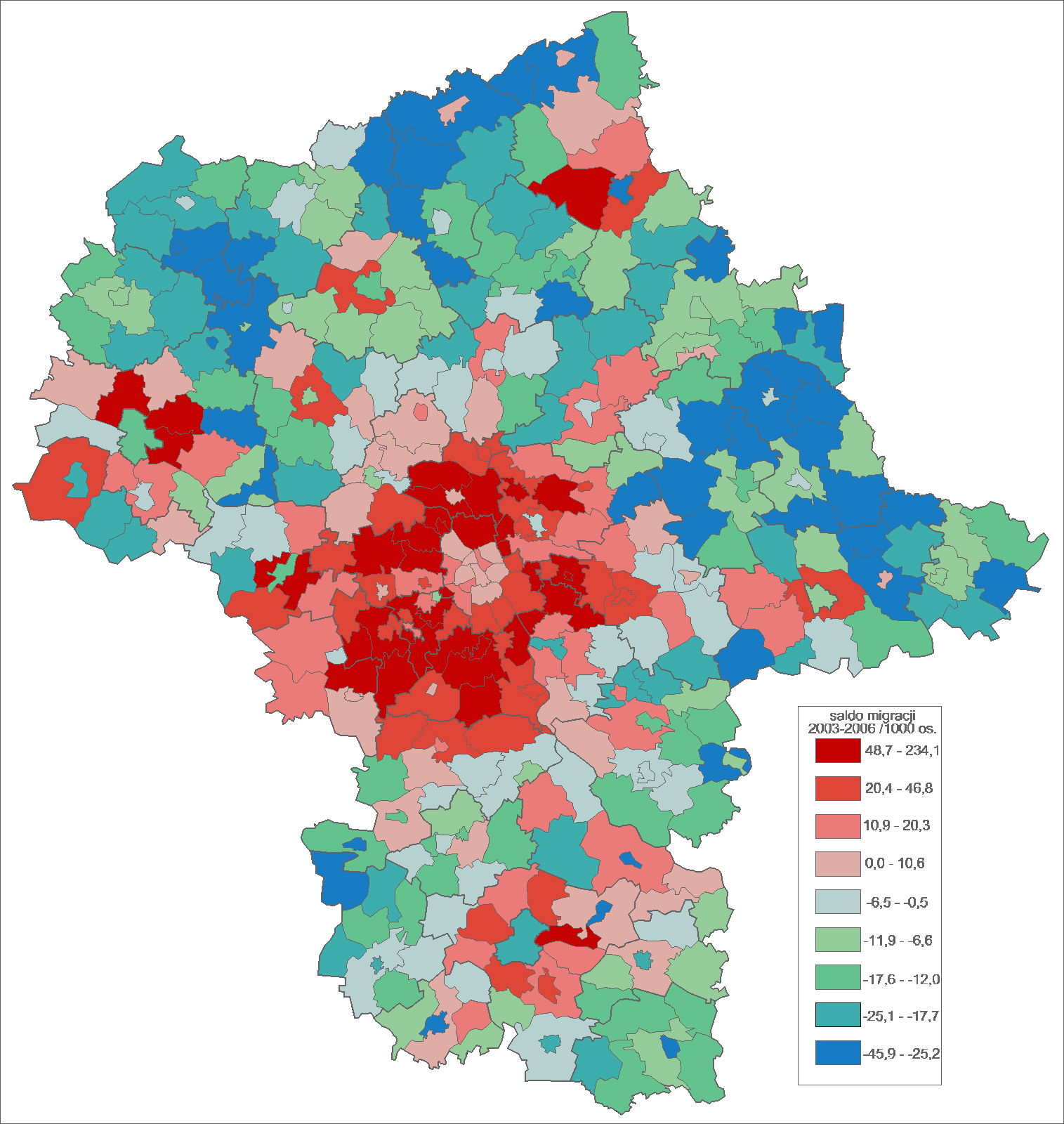 saldo migracji woj. mazowieckiego w 2003-2006 na 1 tys. mieszk. (moved from pl.wiki)